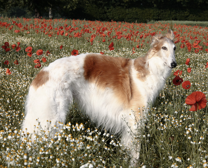 Pjatak v. Smétanka, dit Zambi, propr. Barbara Wickli